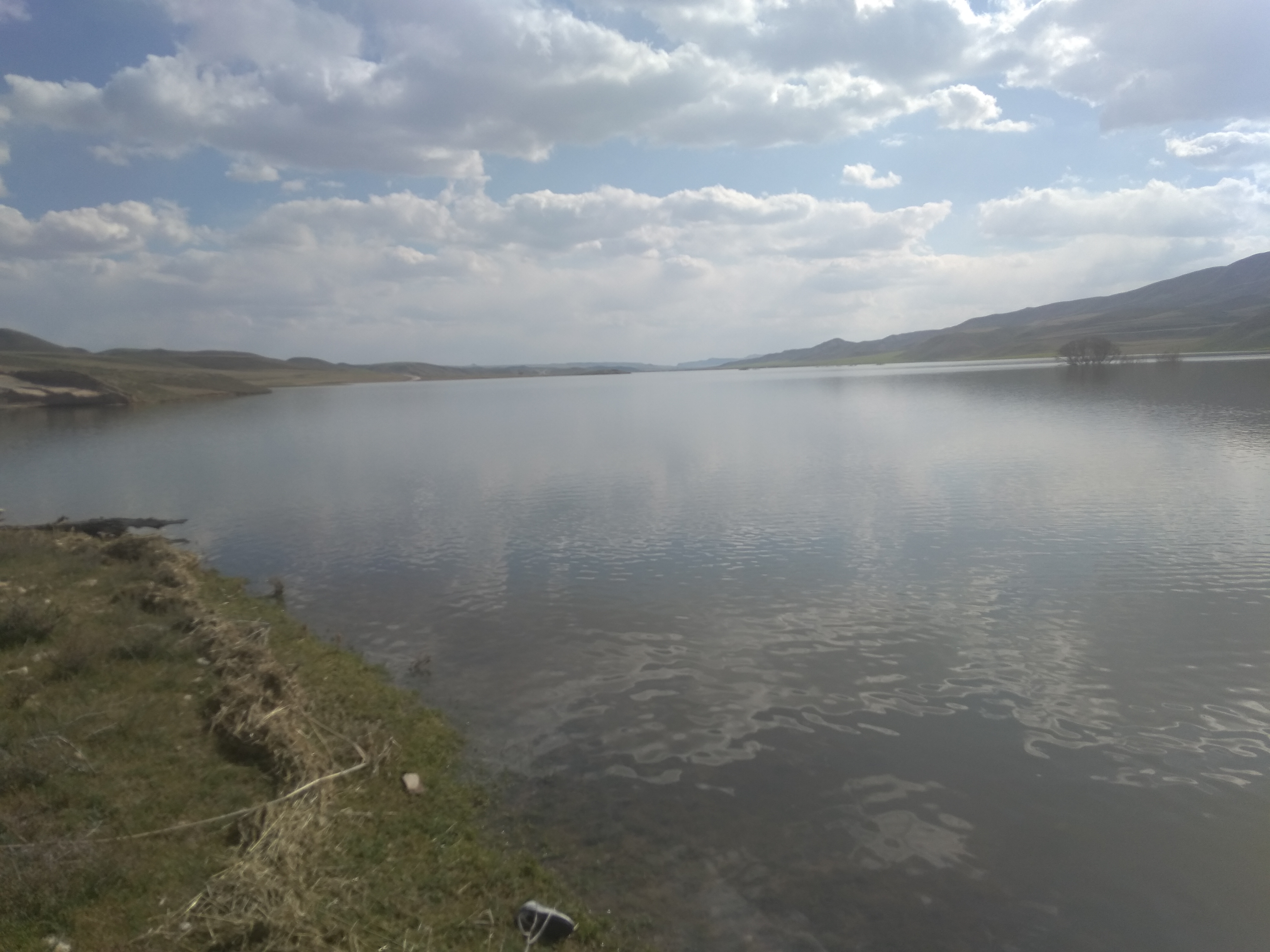 تصویر محو شدن روستای چهل امیران در زیر آب سد تالوار در 5 اردیبهشت 1398 (Picture of the disappearance of the village of Chehel Amiran Bijar under the Talvar Dam)